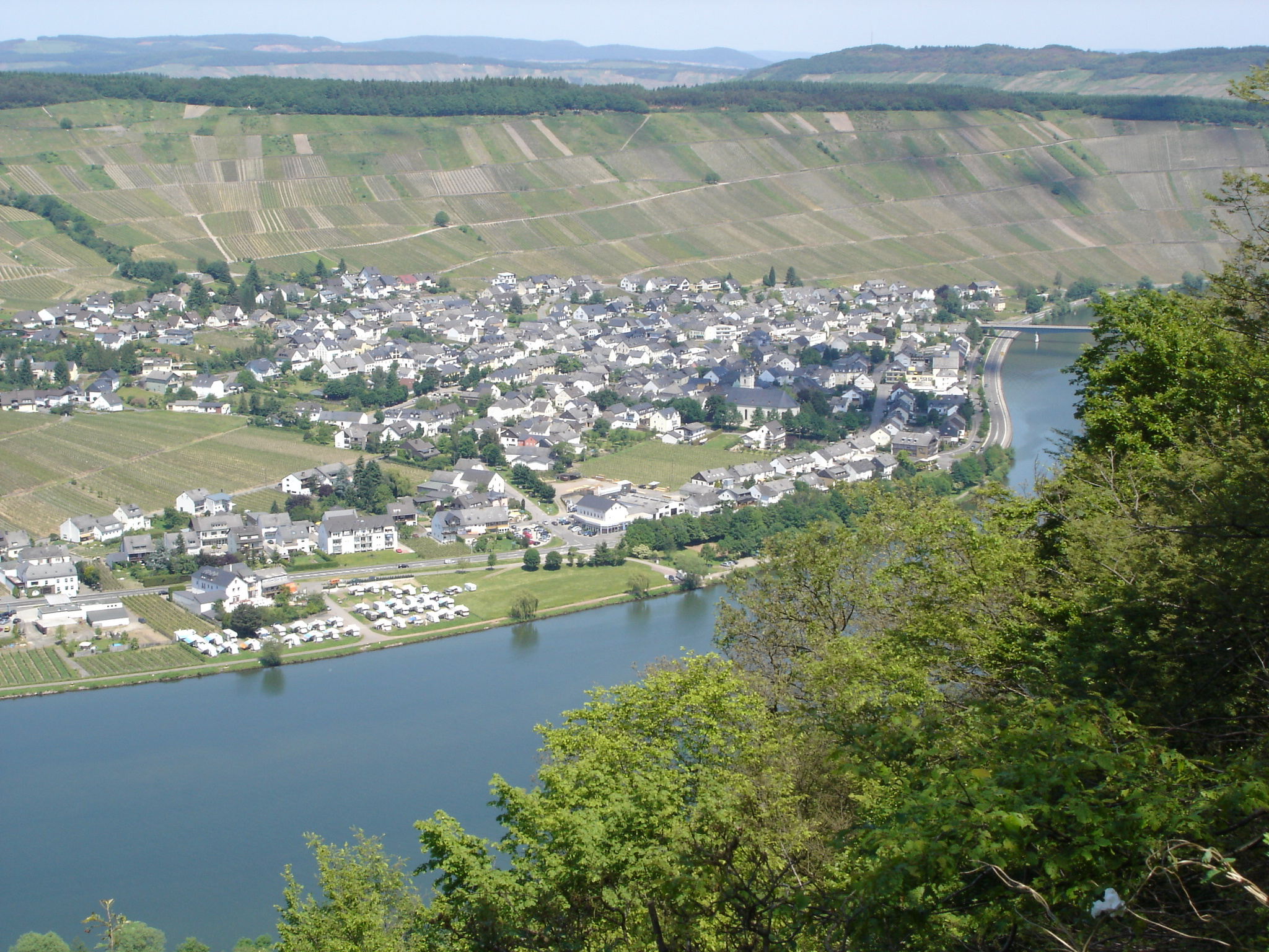 Sicht über Mehring